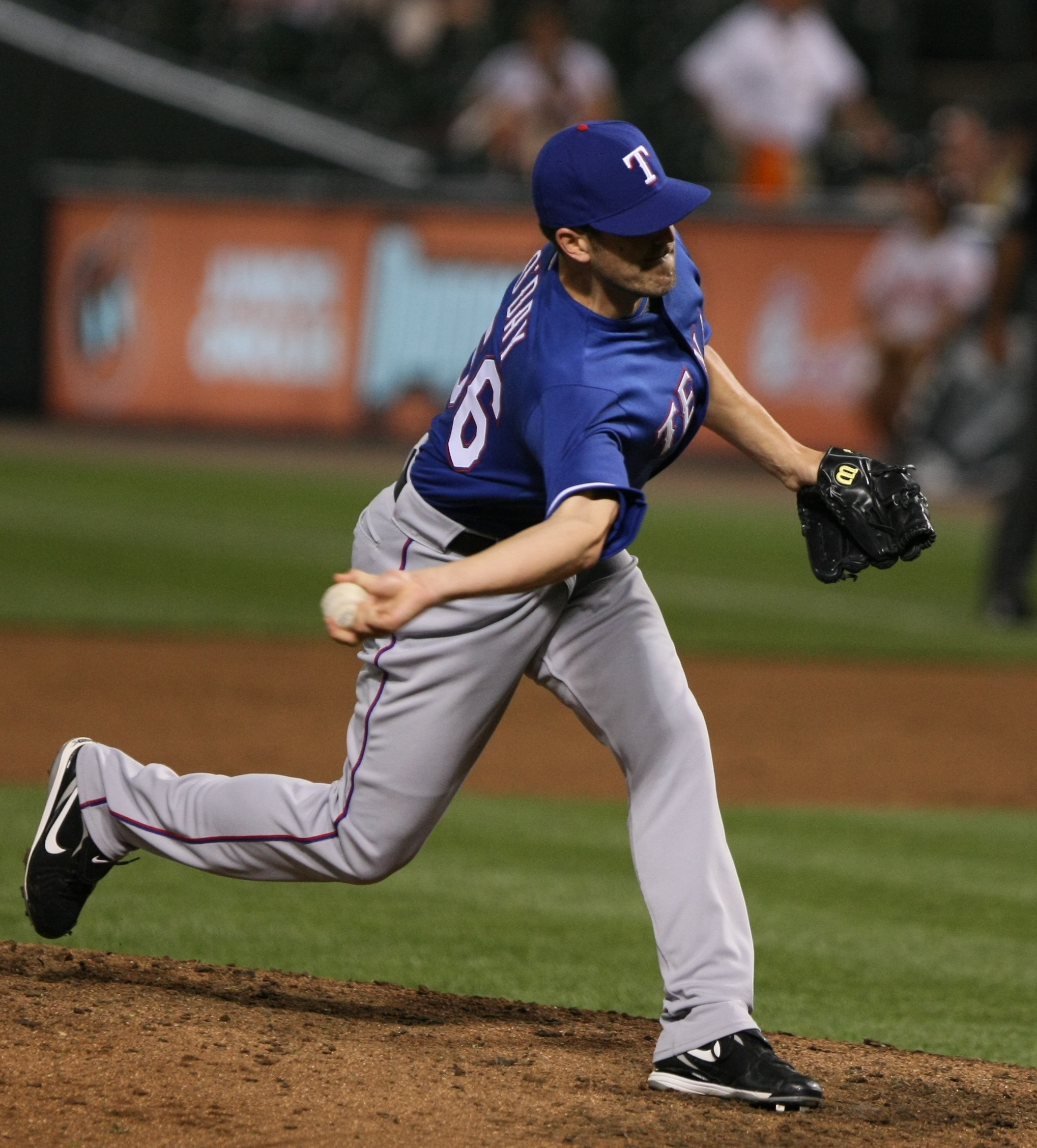 Darren O'Day